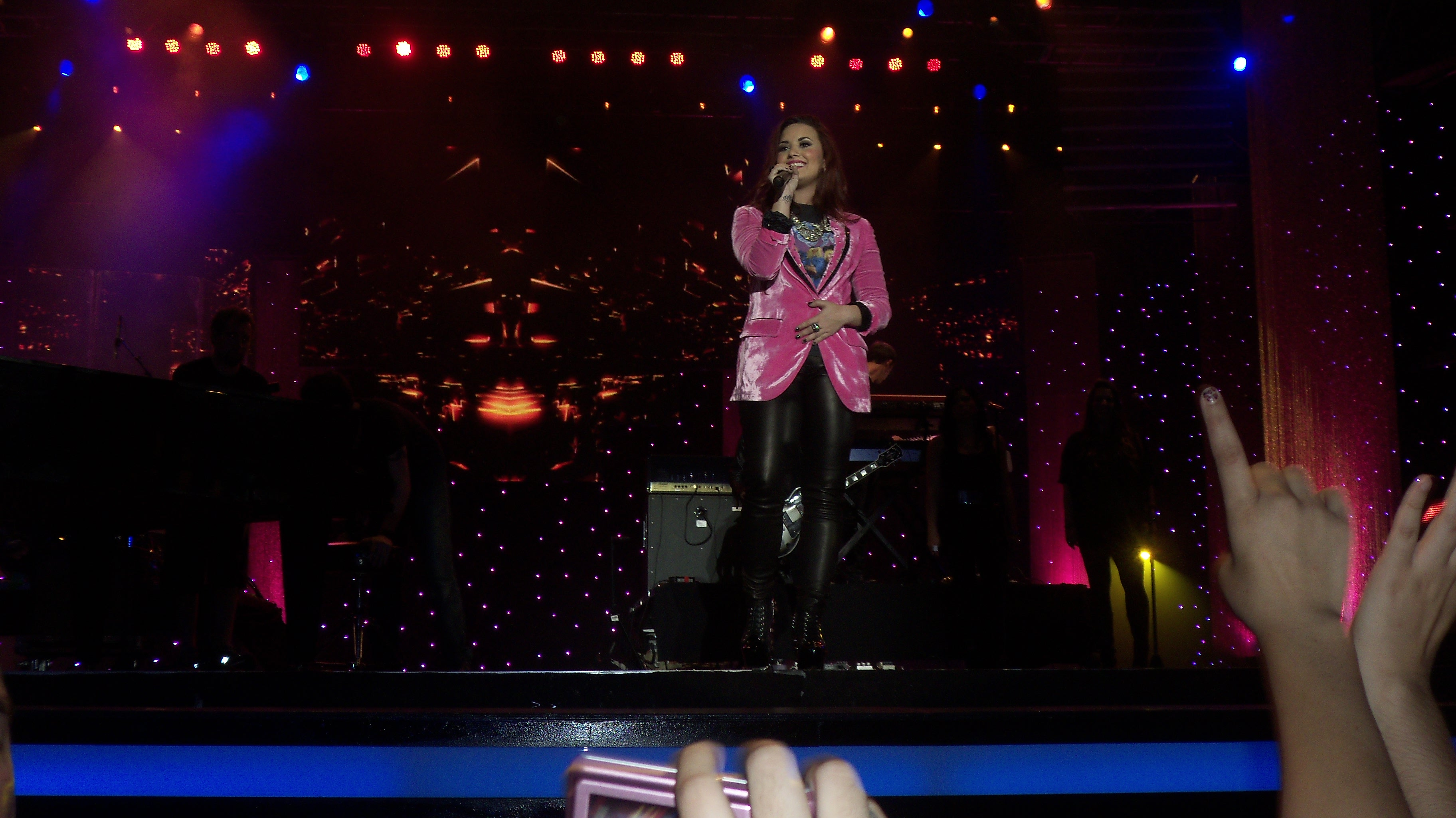 DemiLovato en el Festival verano Iquique 2012